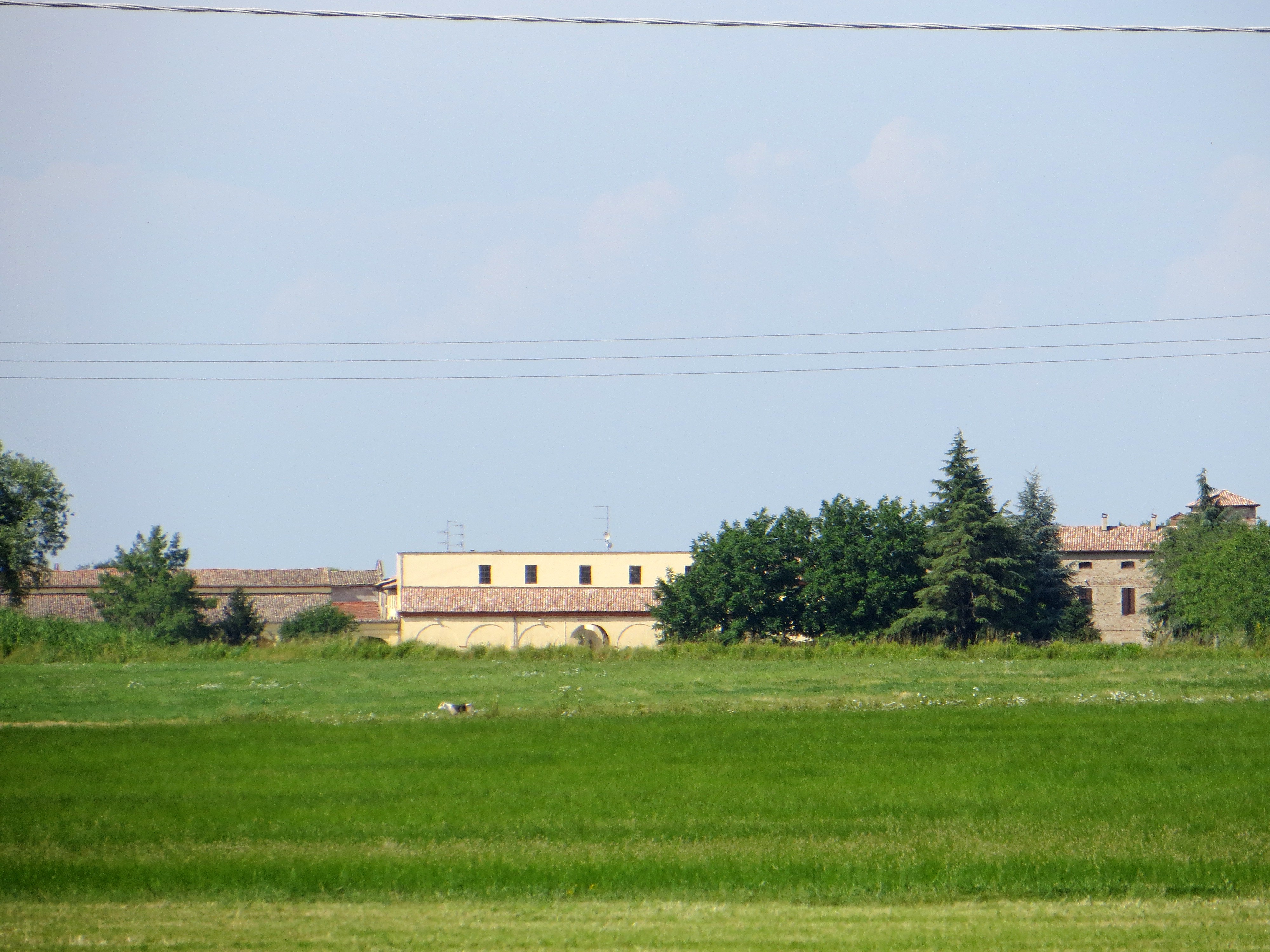 Abbazia di Santa Felicola (Montechiarugolo) - vista da sud del complesso